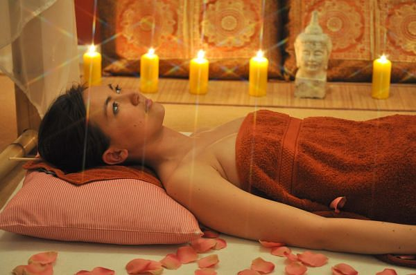 Thai massaggge